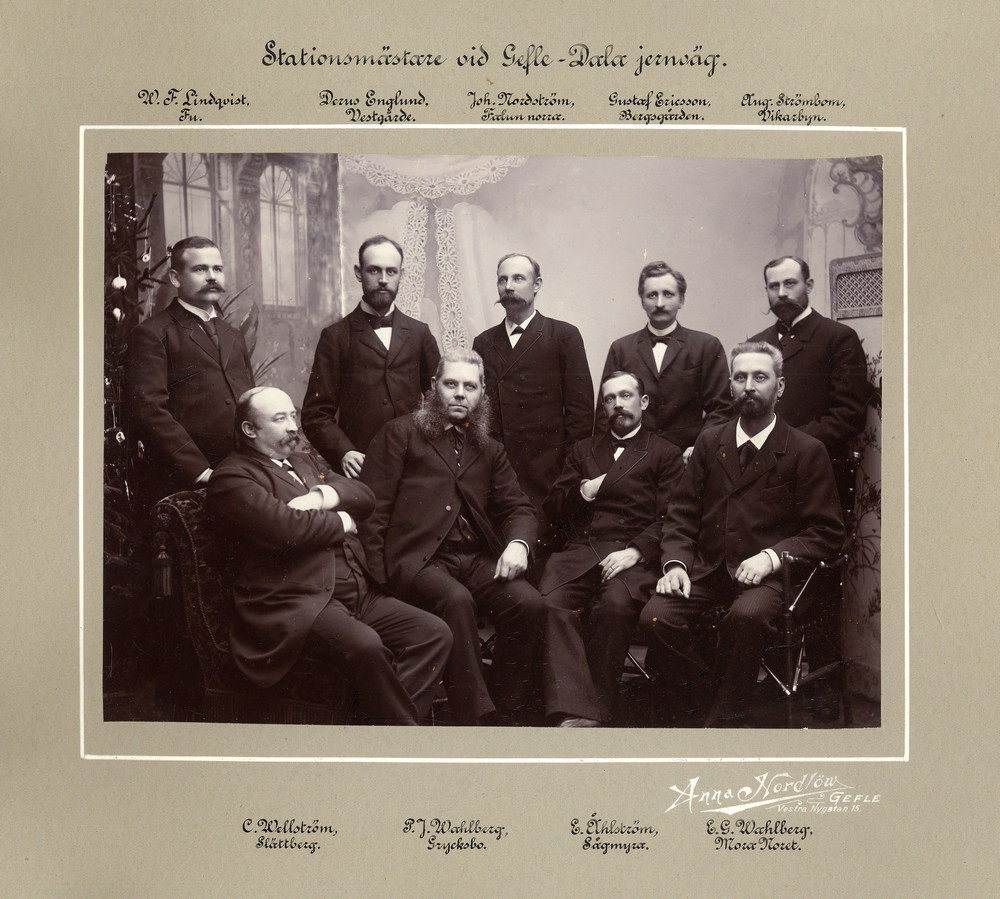 Stationsmästare Falun-Rättvik-Mora järnväg ca 1895. Järnvägen ägdes och drevs av Gävle Dala järnvägar